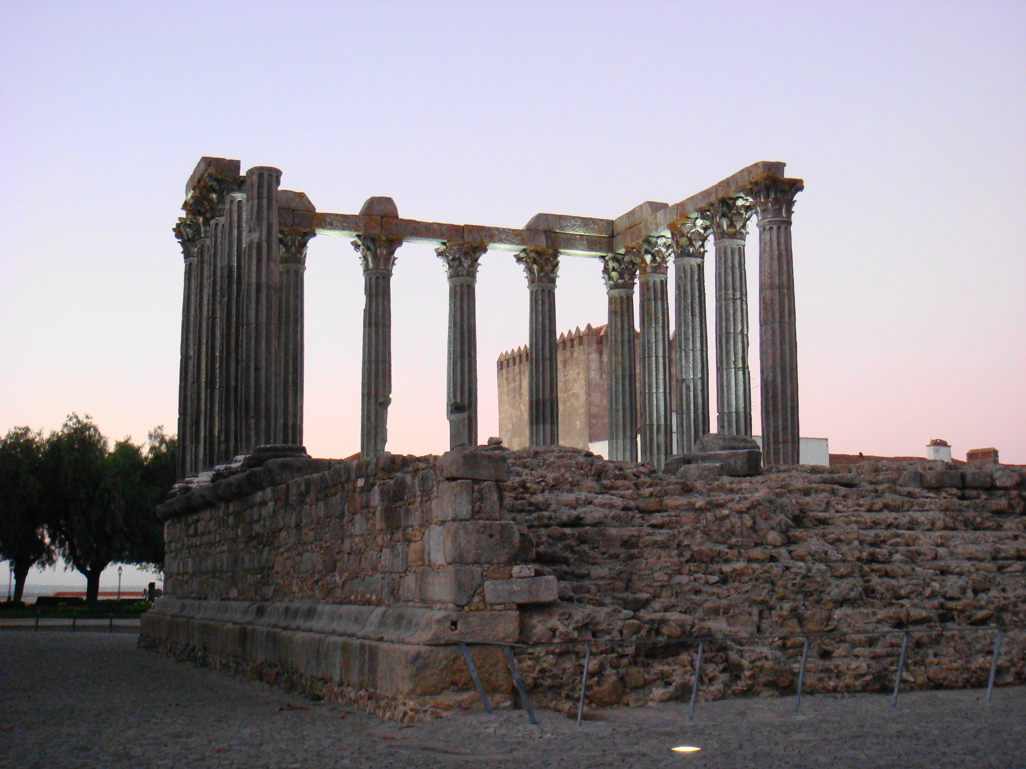 Templo Romano em Évora